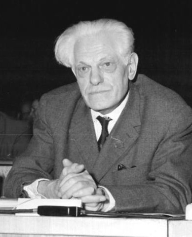 Johann Kopleniq in 1963. Title: Berlin, VI. SED-Parteitag, 1.Tag Factual corrections and alternative descriptions are encouraged separately from the original description. Additionally errors can be reported at this page to inform the Bundesarchiv. Original historic description: Zentralbild Kollektiv Sta-Qu 15.1.1963 VI. Parteitag der SED vom 15.-21.1.1963 in der Werner-Seelenbinder-Halle in Berlin (1.Tag). UBz. Im Präsidium. Rechts: Der Vorsitzende der Kommunistischen Partei Österreichs, Johann Kopienig, links: das Mitglied des Politbüros des ZK der SED, Erich Mückenberger. (Heilig)